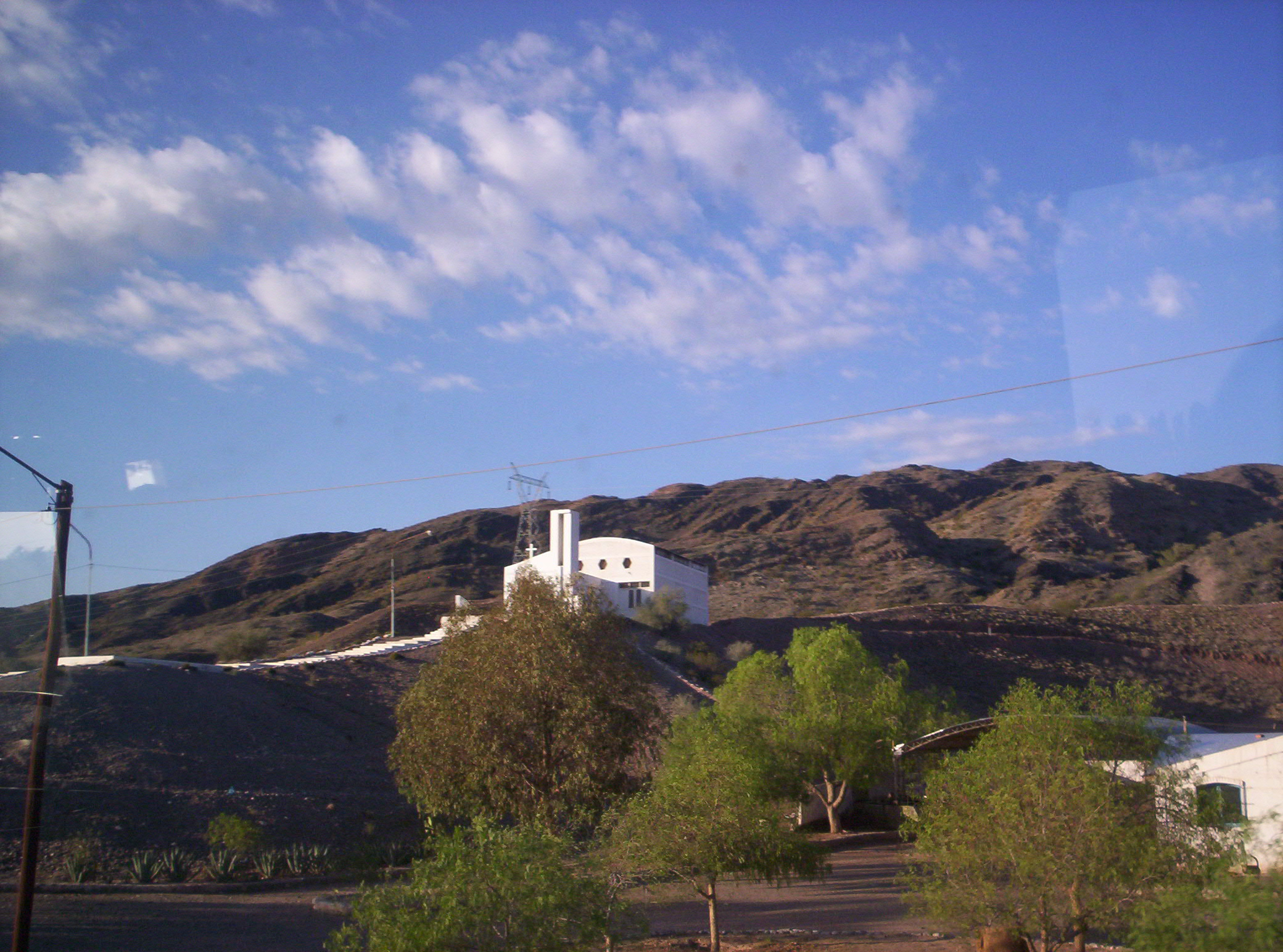 Fotografía del Cerro Valdivia i Iglesia de la Virgen del Tulum, ubicado en la localidad de Carpintería, departamento Pocito, San Juan Argentina Photograph of Cerro Valdivia in Church of Our Lady of Tulum, located in Carpintería, Pocito department, San Juan Argentina